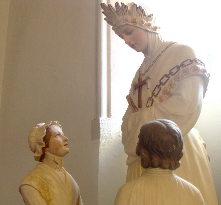 Statue de la Vierge de la Salette avec les enfants (détail), intérieur de l'église de Corps.